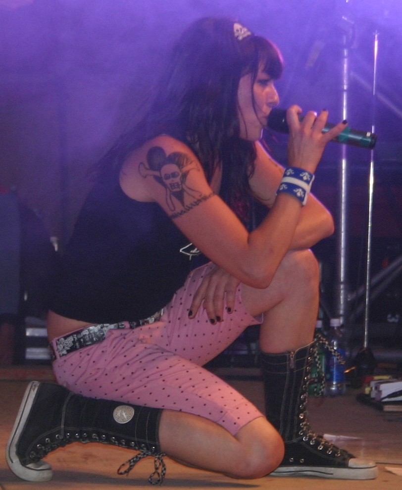 Annie Dufresne en spectacle